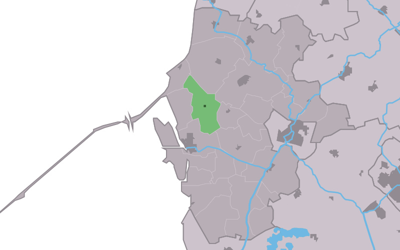 Kaartsje fan himrik fan Wûns